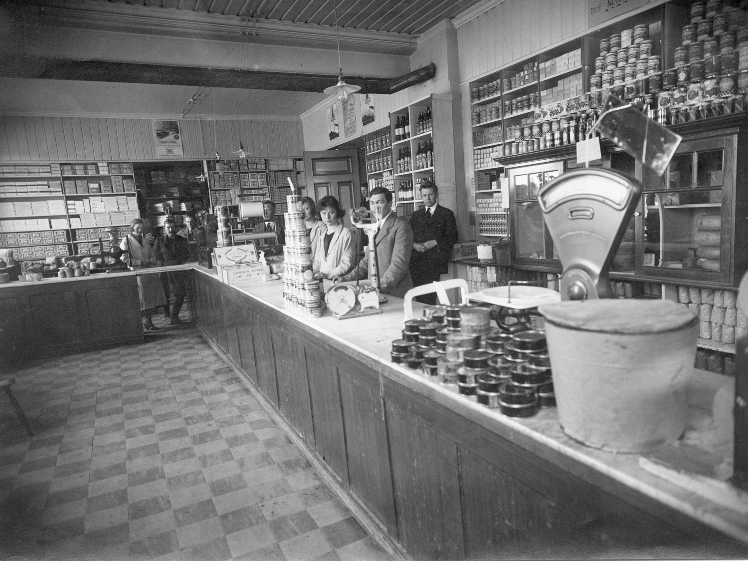 Ukjent fotograf og år. Fra arkivet etter Coop (Arkivref.: PA-1394Ub9Ringerike001)